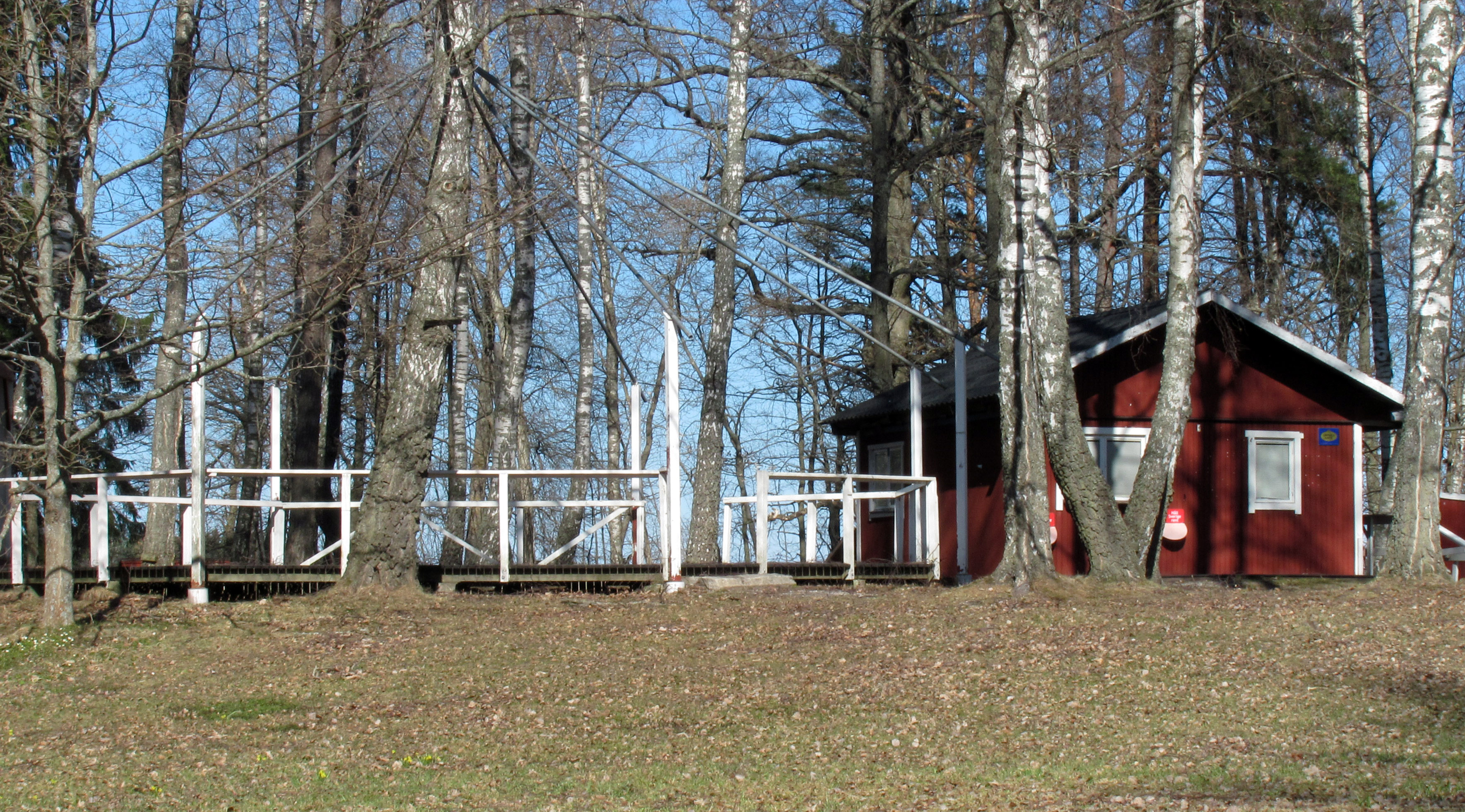 Norrby holme, dansbana och koisk